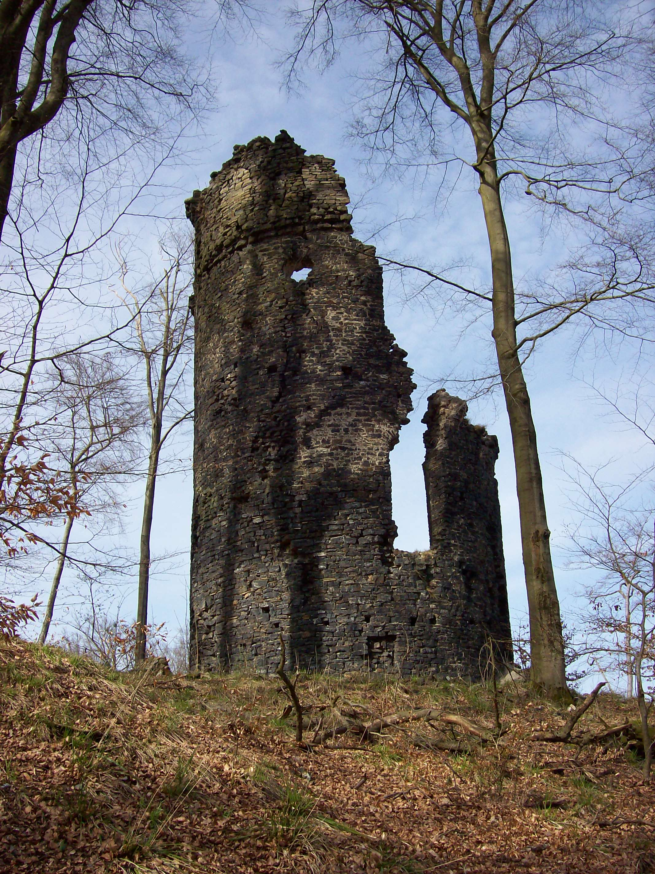 Turmruine Laer, Meschede (Germany)